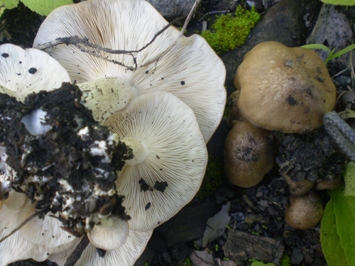 ホンシメジです。民家のすぐそばに生えていました。 澄まし汁やシメジご飯にしました。 それはおいしかったです。